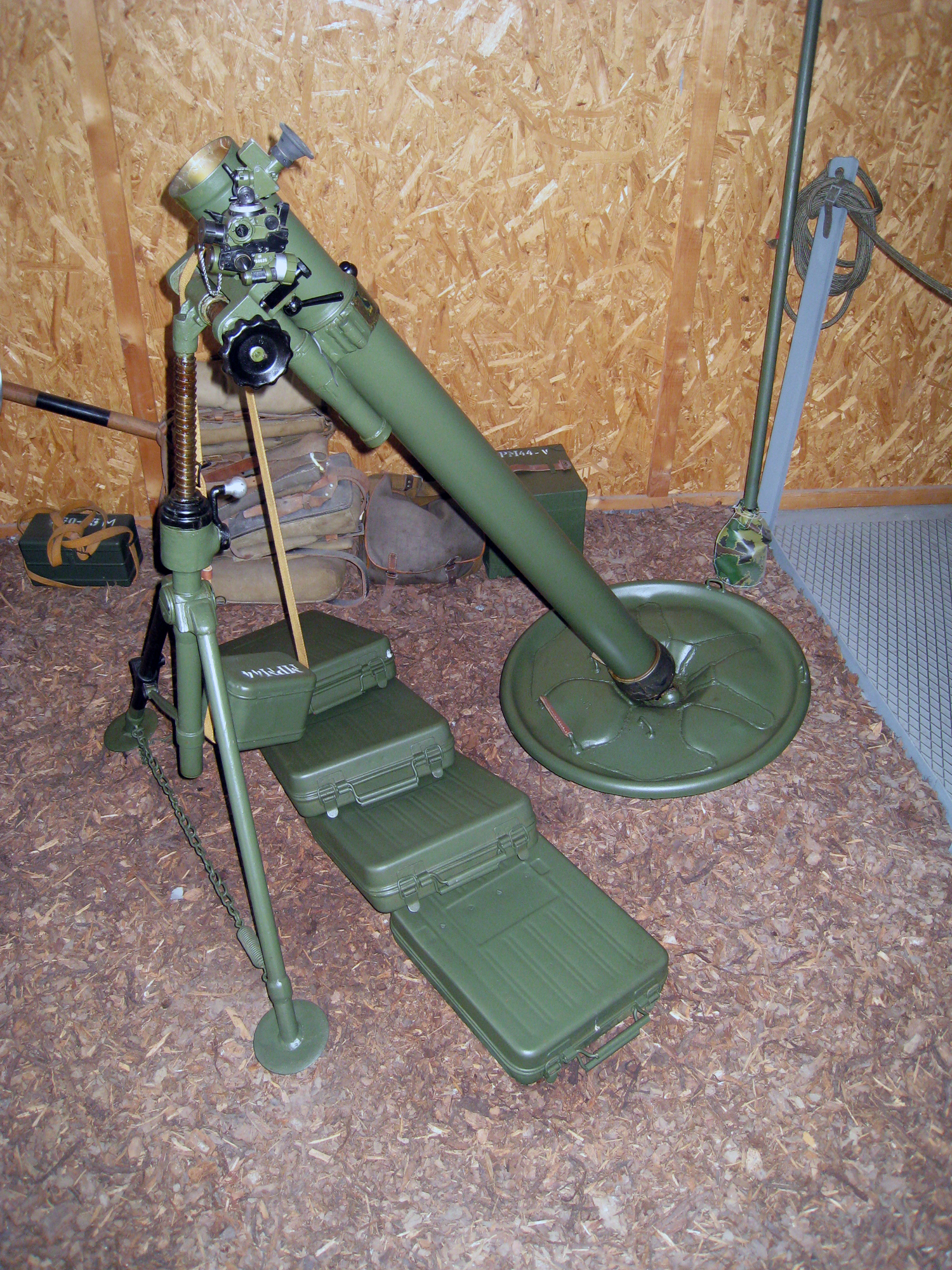 8,2 cm Minenwerfer BM-41 im Museum Full